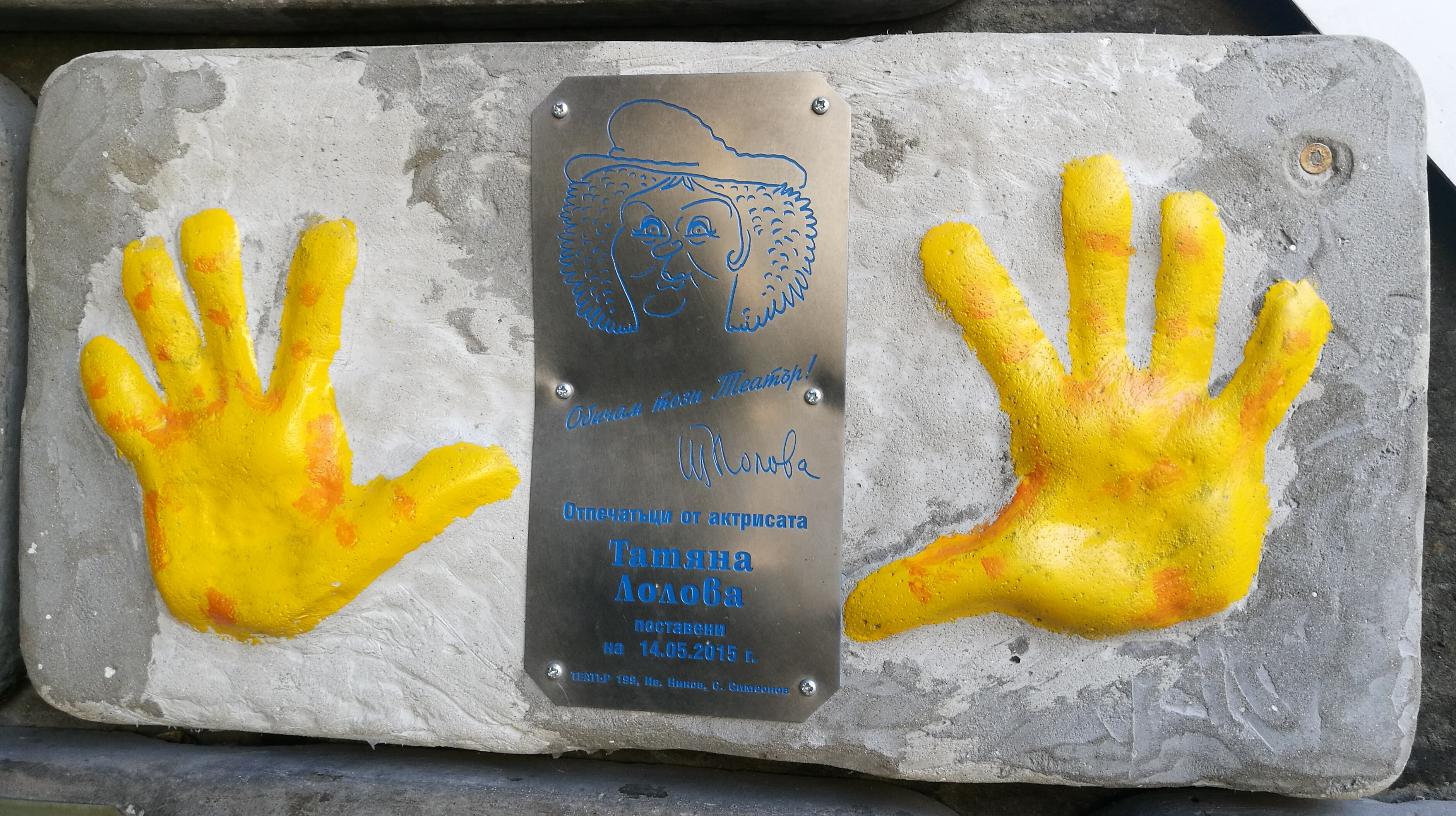 Стената на славата пред Театър 199 - пано с отпечатъци, послание и шарж на Татяна Лолова.